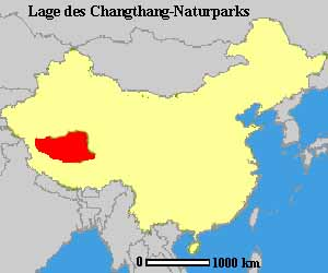 Lage des Changthang-Naturparks in der VR China